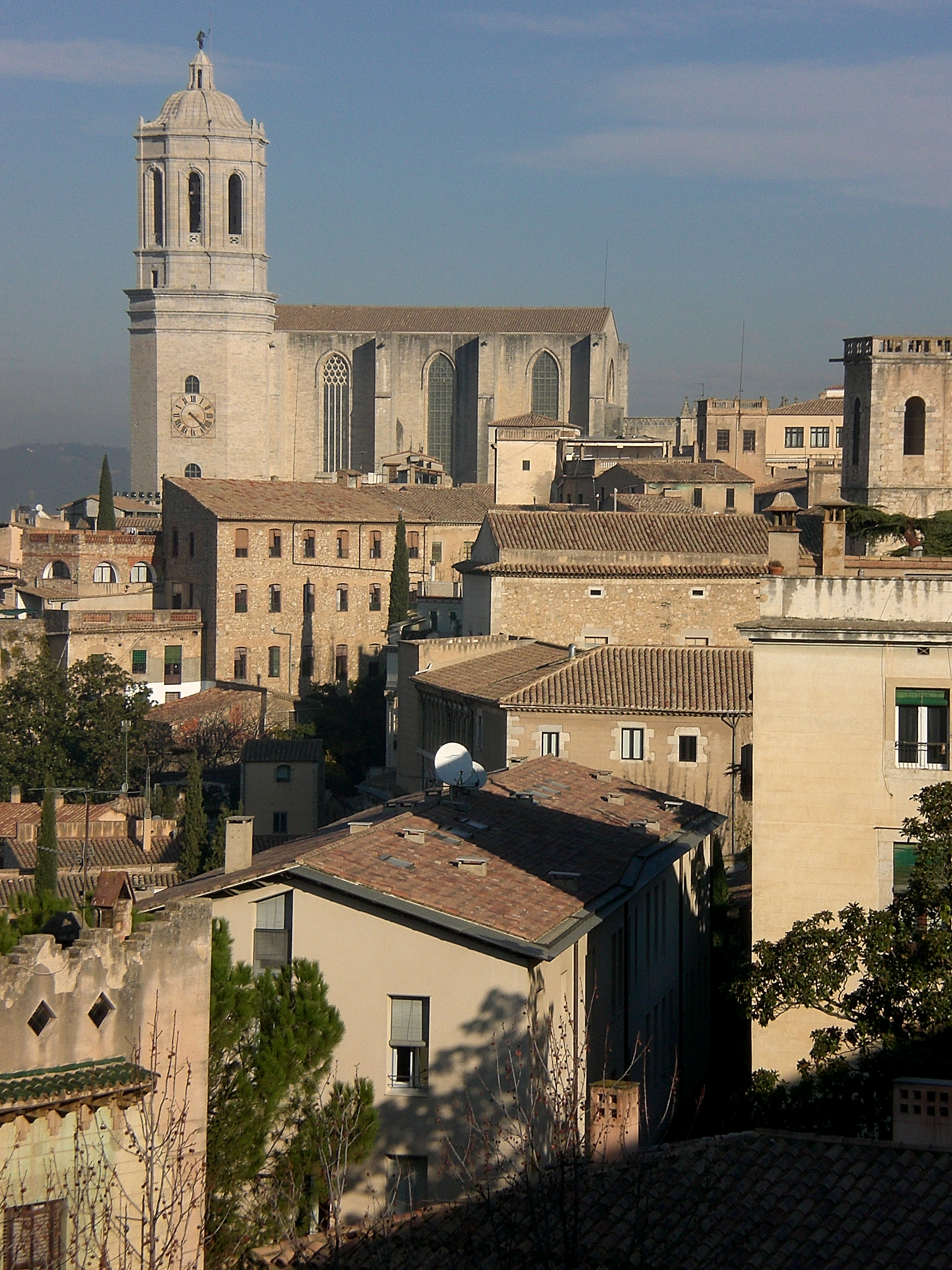 Vista del barrio viejo y la catedral de Gerona desde la muralla de la ciudad.